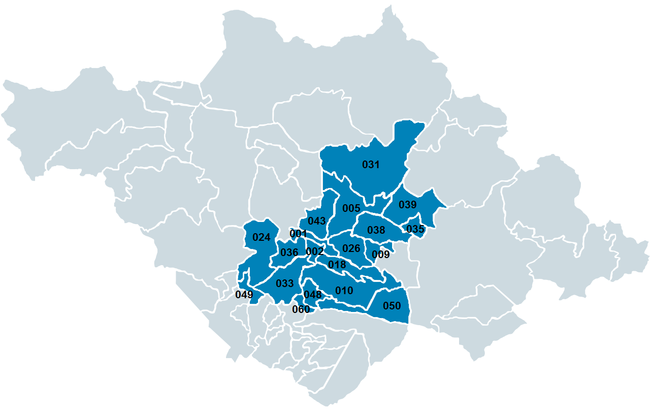 Municipios pertenecientes a la Zona Metropolitana de Tlaxcala-Apizaco.